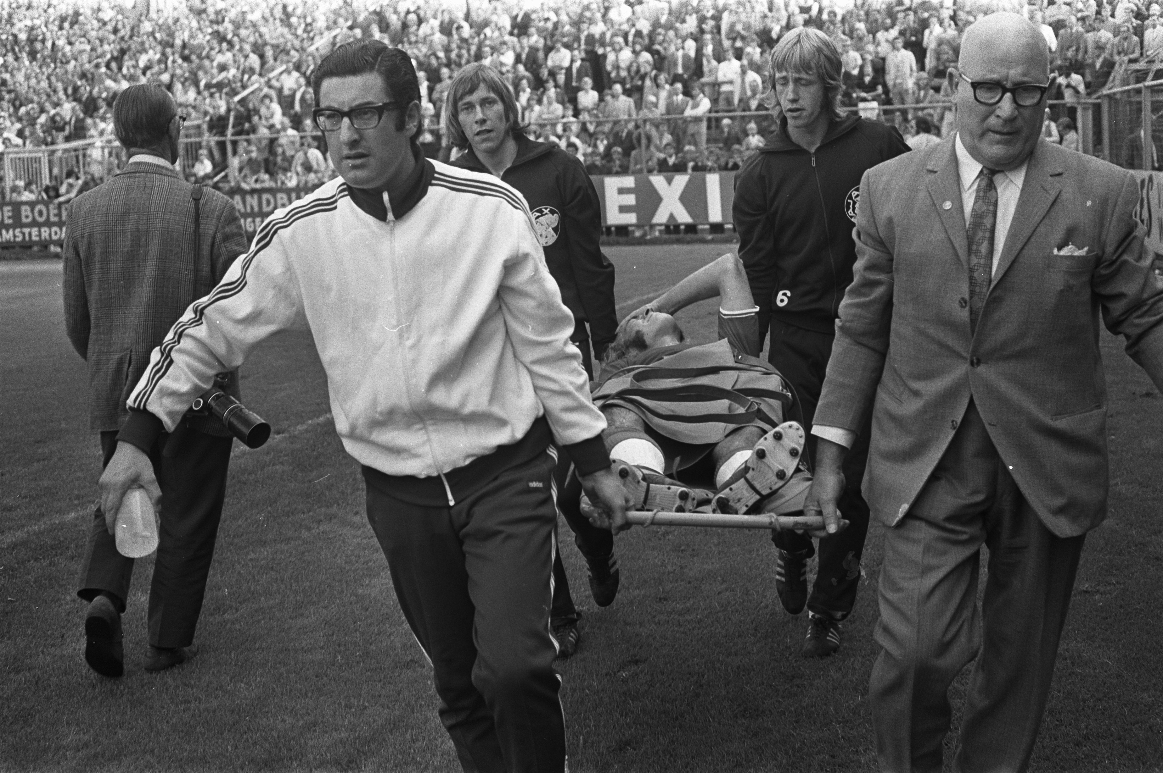 Collectie / Archief : Fotocollectie Anefo Reportage / Serie : [ onbekend ] Beschrijving : Ajax tegen Excelsior 1-0, Blankenburg (Ajax) wordt van veld gedragen door o.a. (links) S. Muller Datum : 5 september 1971 Trefwoorden : sport, voetbal Persoonsnaam : S. Muller Instellingsnaam : Excelsior Fotograaf : Peters, Hans / Anefo Auteursrechthebbende : Nationaal Archief Materiaalsoort : Negatief (zwart/wit) Nummer archiefinventaris : bekijk toegang 2.24.01.05 Bestanddeelnummer : 924-9066